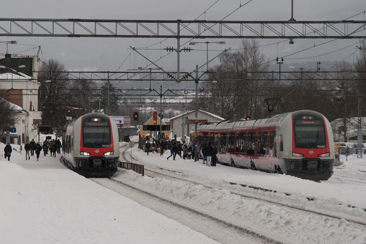 To tog på linje L12 møtes på Hokksund stasjon.